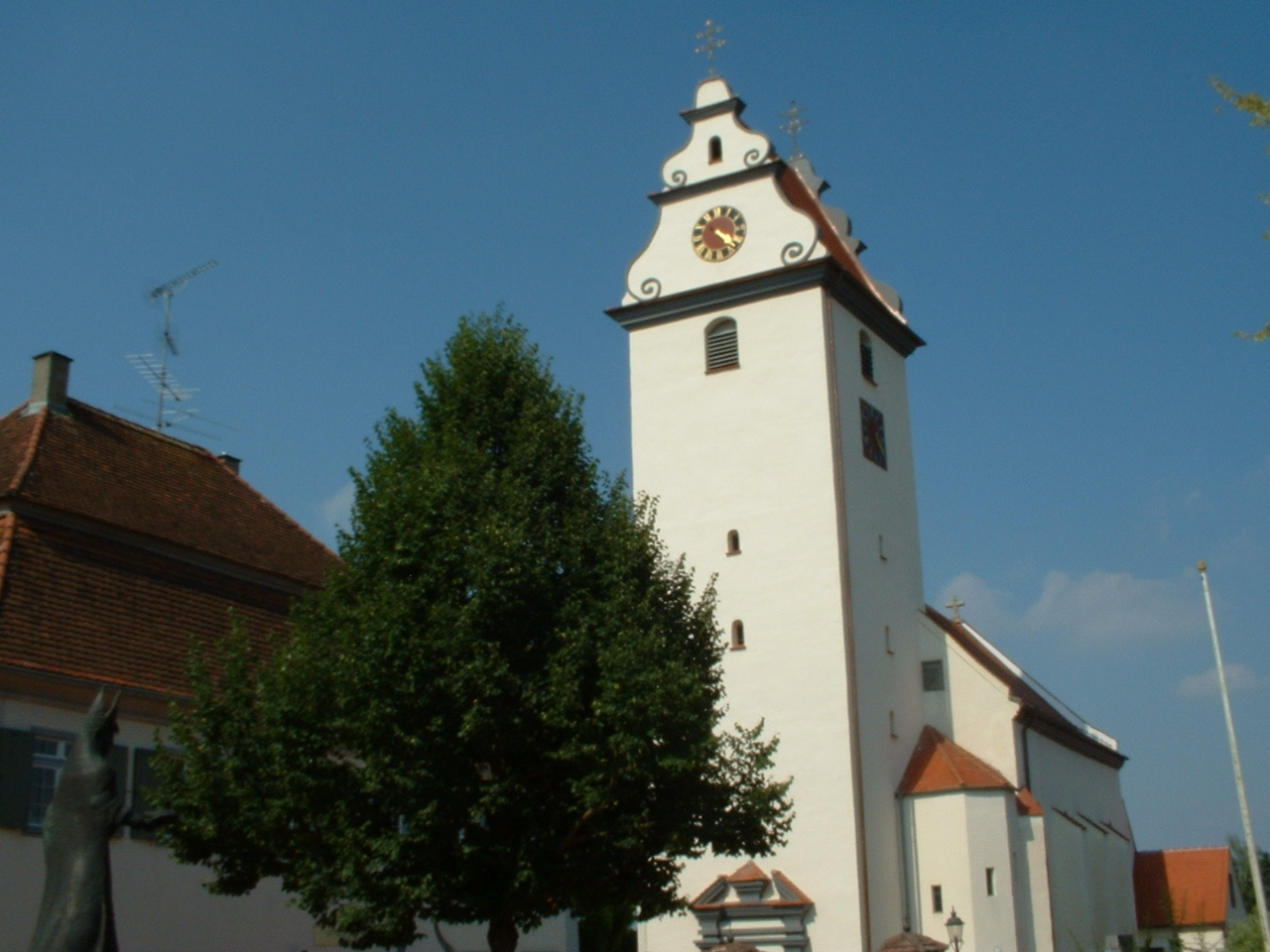 Alberweiler, parish church St Ulrich